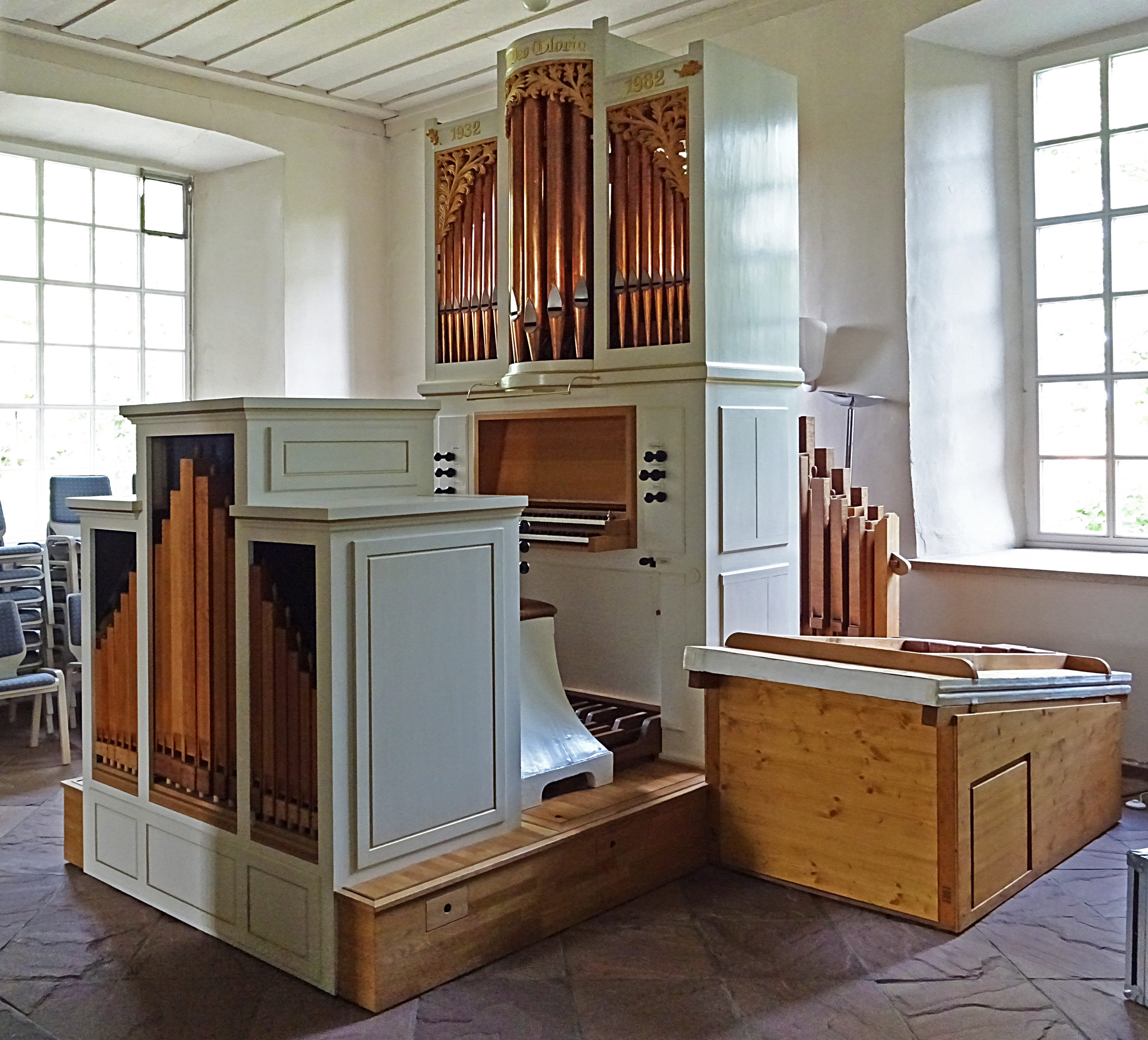 Winterkirchenorgel (II/P13) in der Nicolaikirche (Herzberg am Harz)